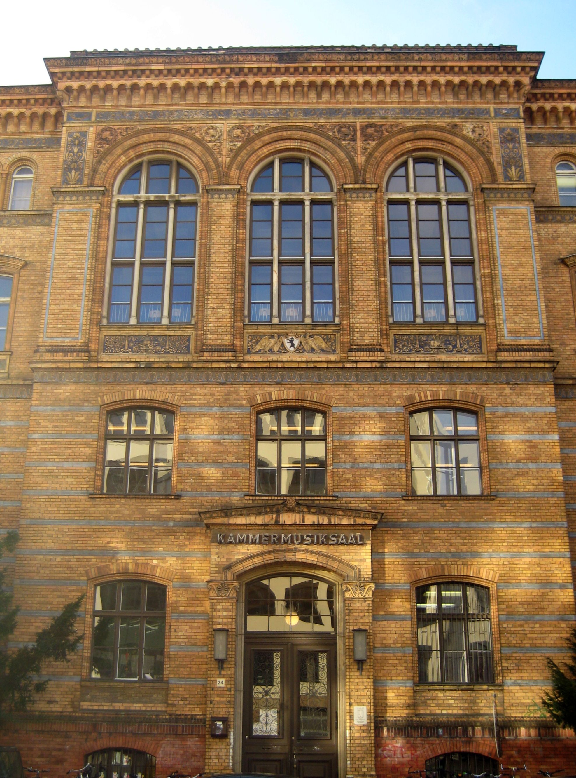 mittlerer Gebäudeteil, Clara-Grundwald-Schule, Berlin-Kreuzberg, früher Askanisches Gymnasium, errichtet von H. Blankenstein und A. Reich (1874/1875)